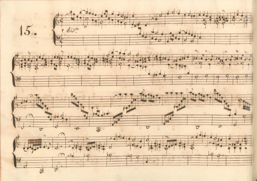 La sonate K. 402, telle qu'elle se présente dans le manuscrit de Parme, volume XI no. 15.